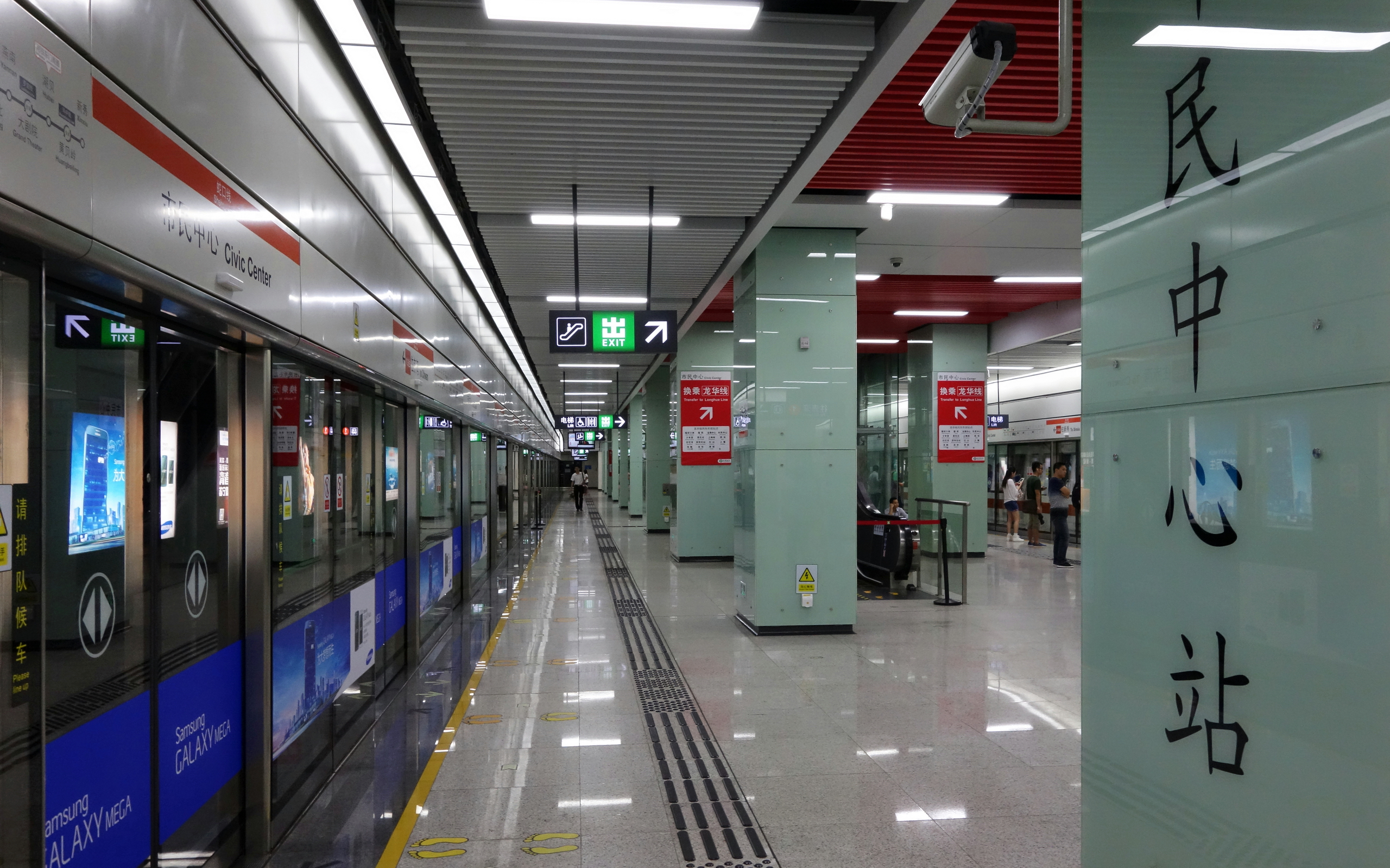 深圳地铁蛇口线市民中心站站台